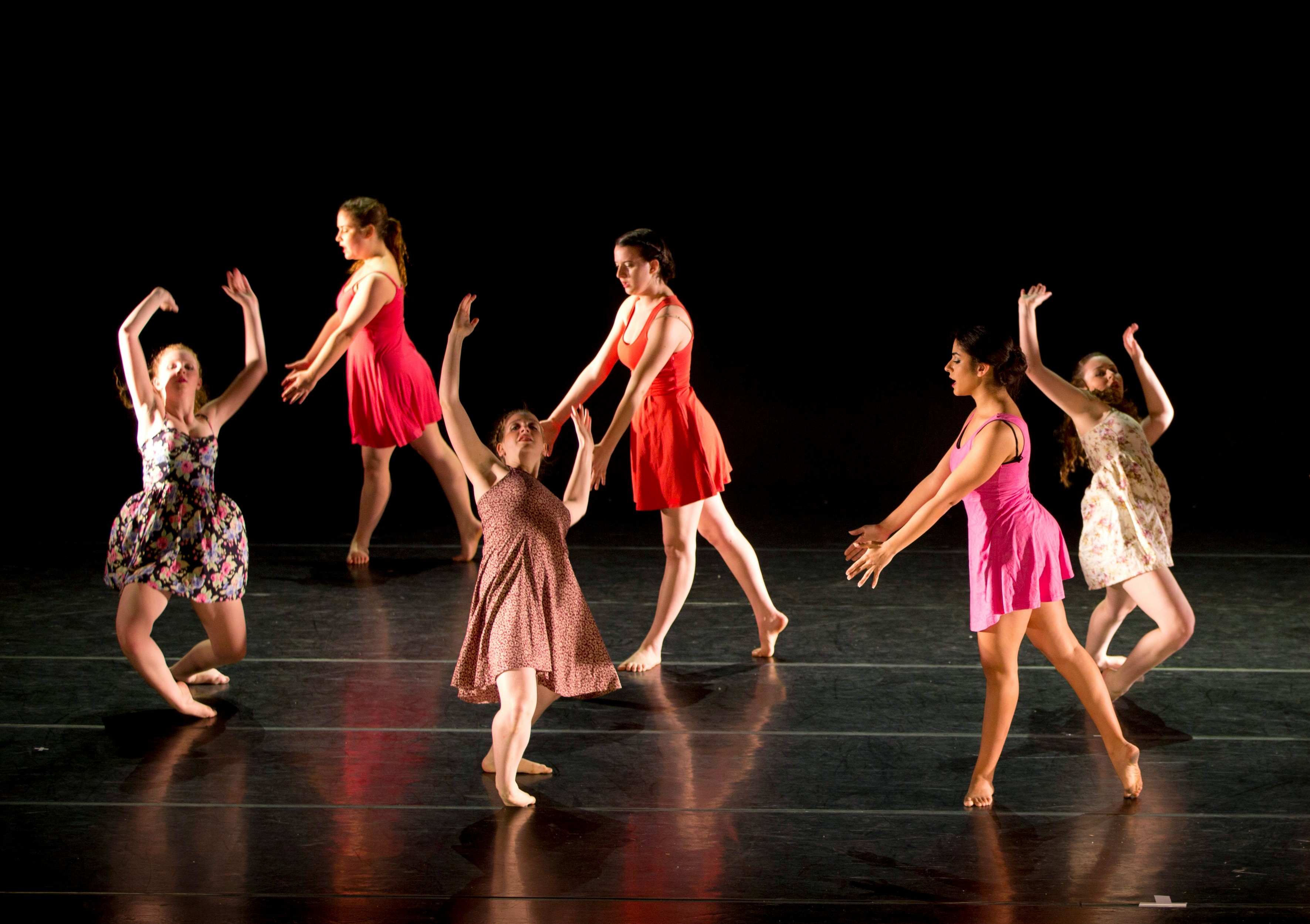 מתוך הופעת סיום של מגמת המחול בתכון מוסינזון הוד השרון בשנת תשע"ה